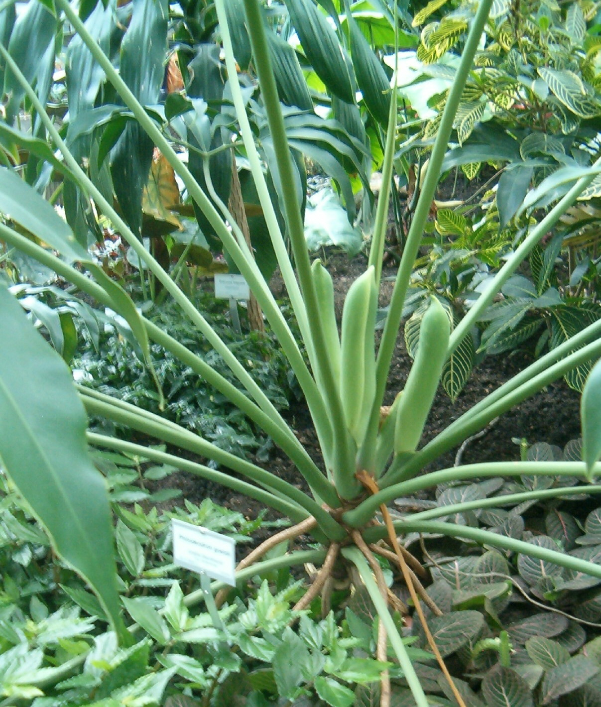 At Botanical Gardens Berlin-Dahlem Species Philodendron goeldii